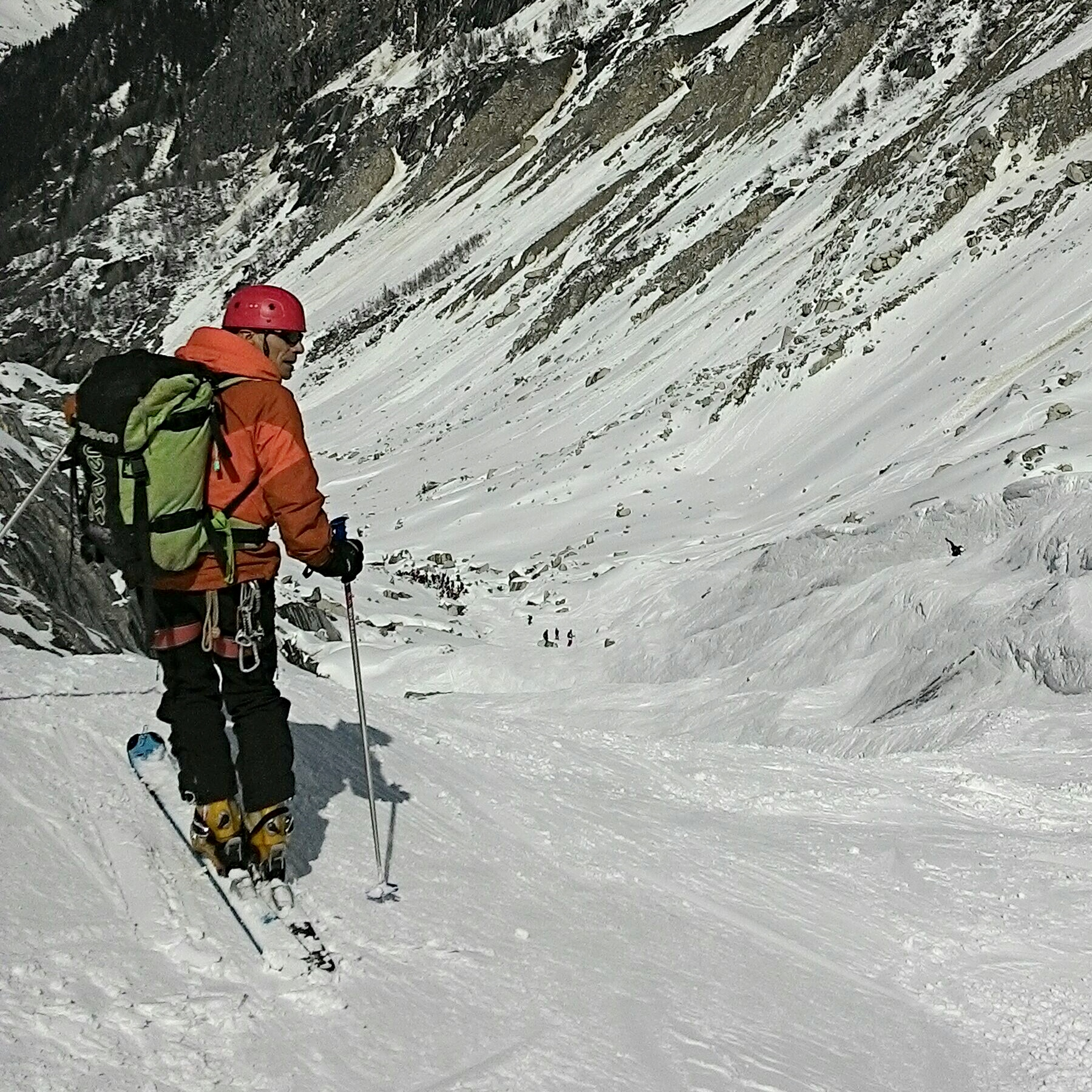 Giampiero Di Federico nella Valèe Blanche, 2016